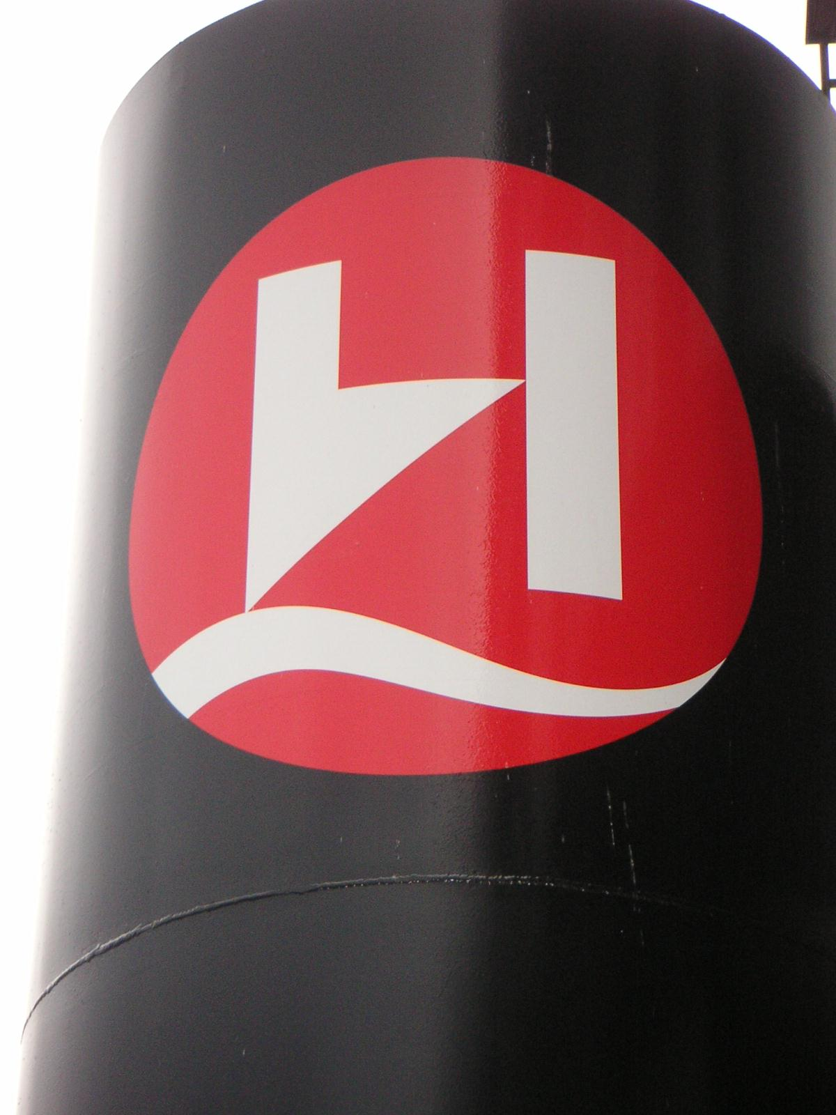 Hurtigruten ASA